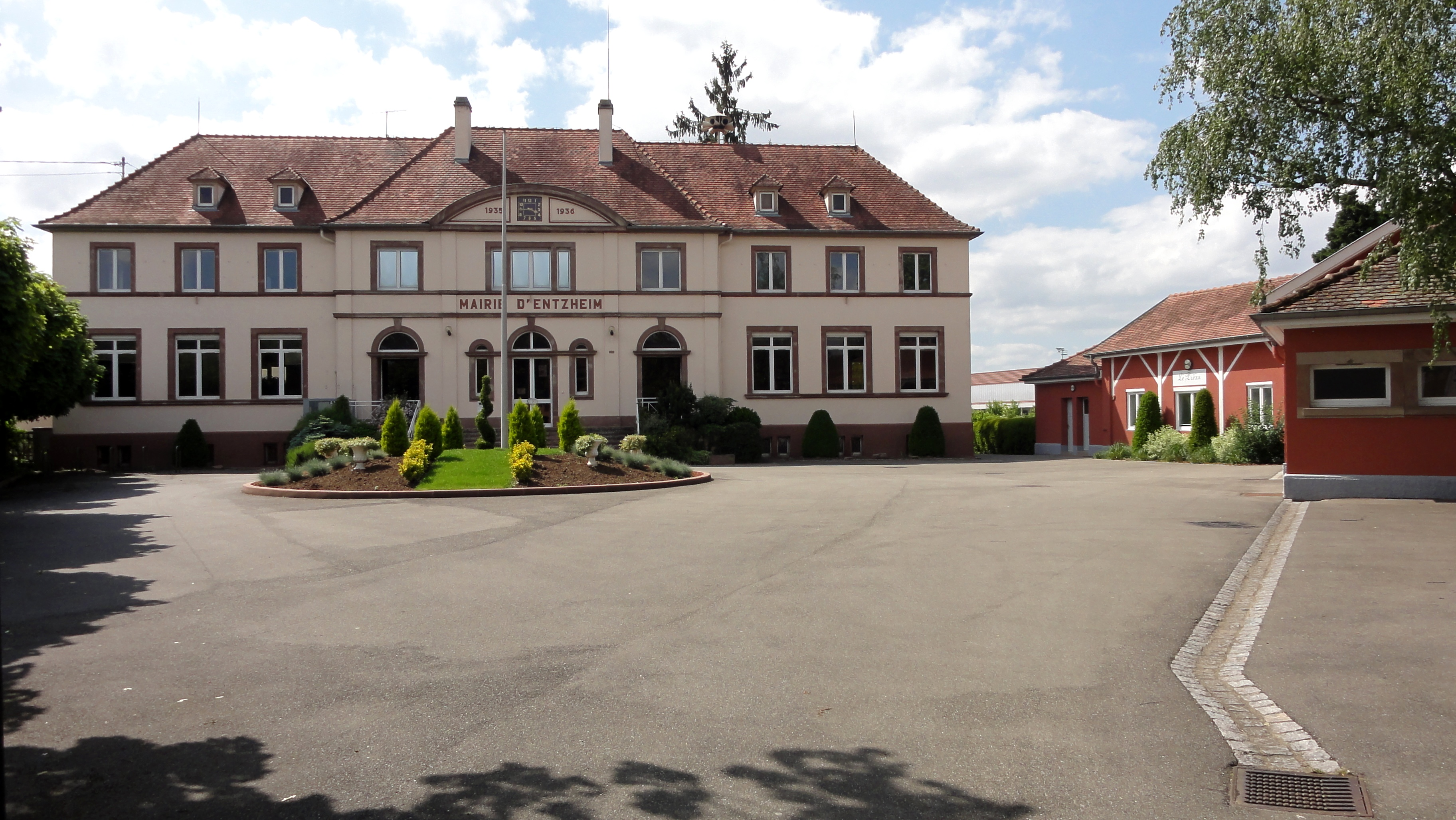 Alsace, Bas-Rhin, Entzheim, Mairie (1938).